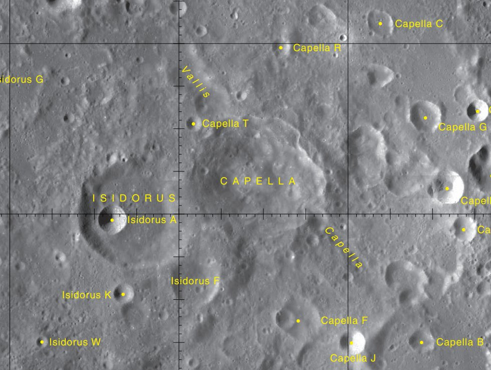 Vallis Capella. (Imagen LRO)